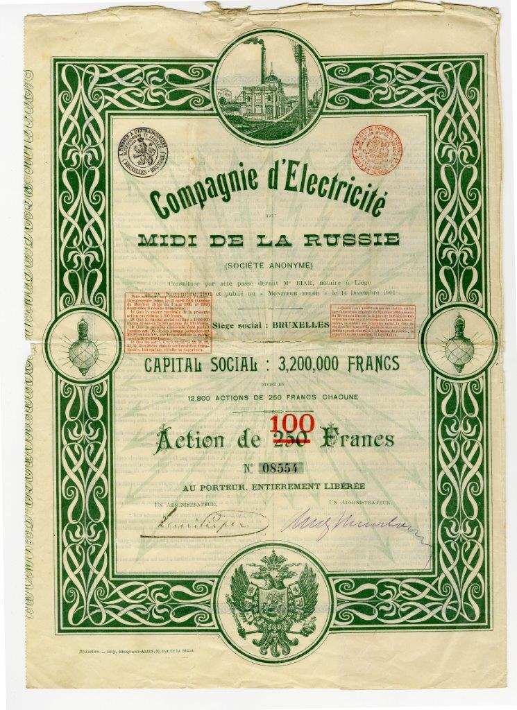 Акция в 100 бельгийских франков (до переоценки - в 250) Электрического общества Южной России. Г. Льеж (Бельгия)